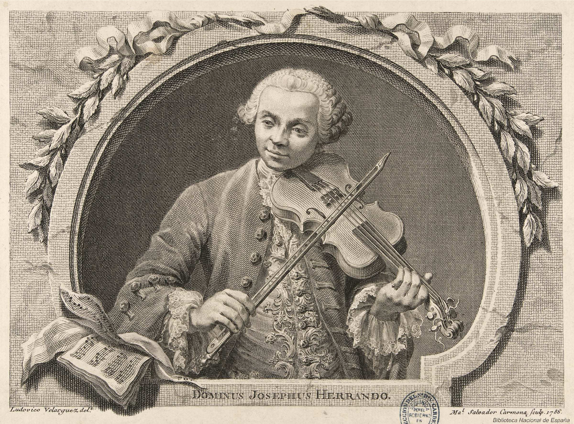 Retrato de José Herrando, grabado calcográfico firmado Ludovico Velazquez delt.t ; Ma.l Salvador Carmona Sculp. 1756. Biblioteca Nacional de España